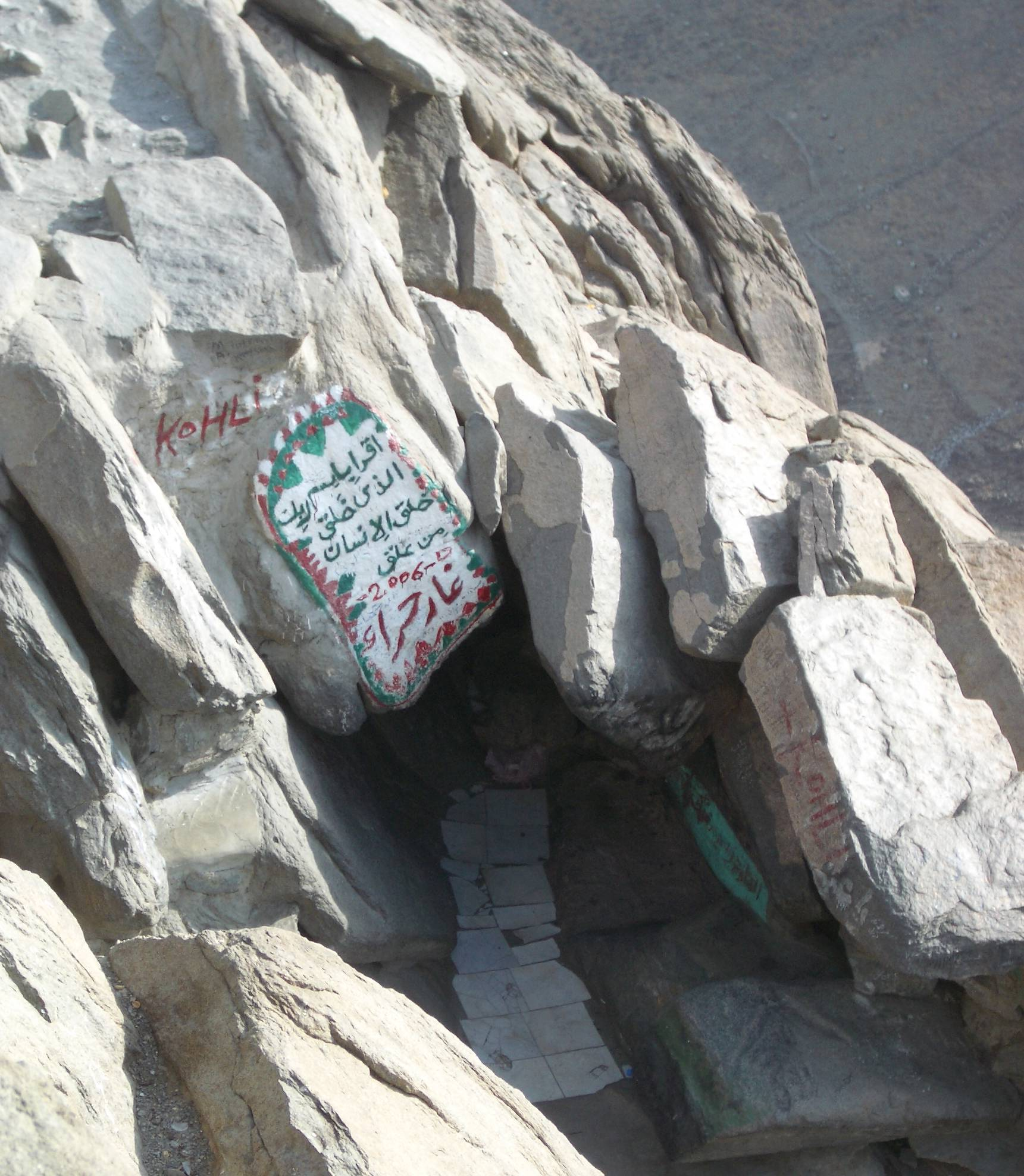 Grotte Hira, Mecca